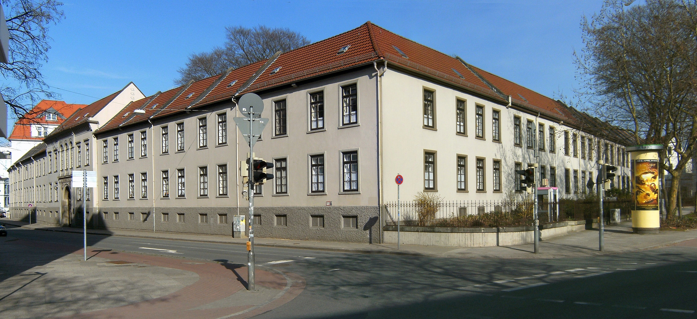 St.-Remberti-Stift, Pröven in Bremen, Sankt-Remberti-Stift 1.Die Gesamtanlage ist ein geschütztes Kulturdenkmal in der Freien Hansestadt Bremen, mit der Nr. 1031 beim Landesamt für Denkmalpflege registriert.